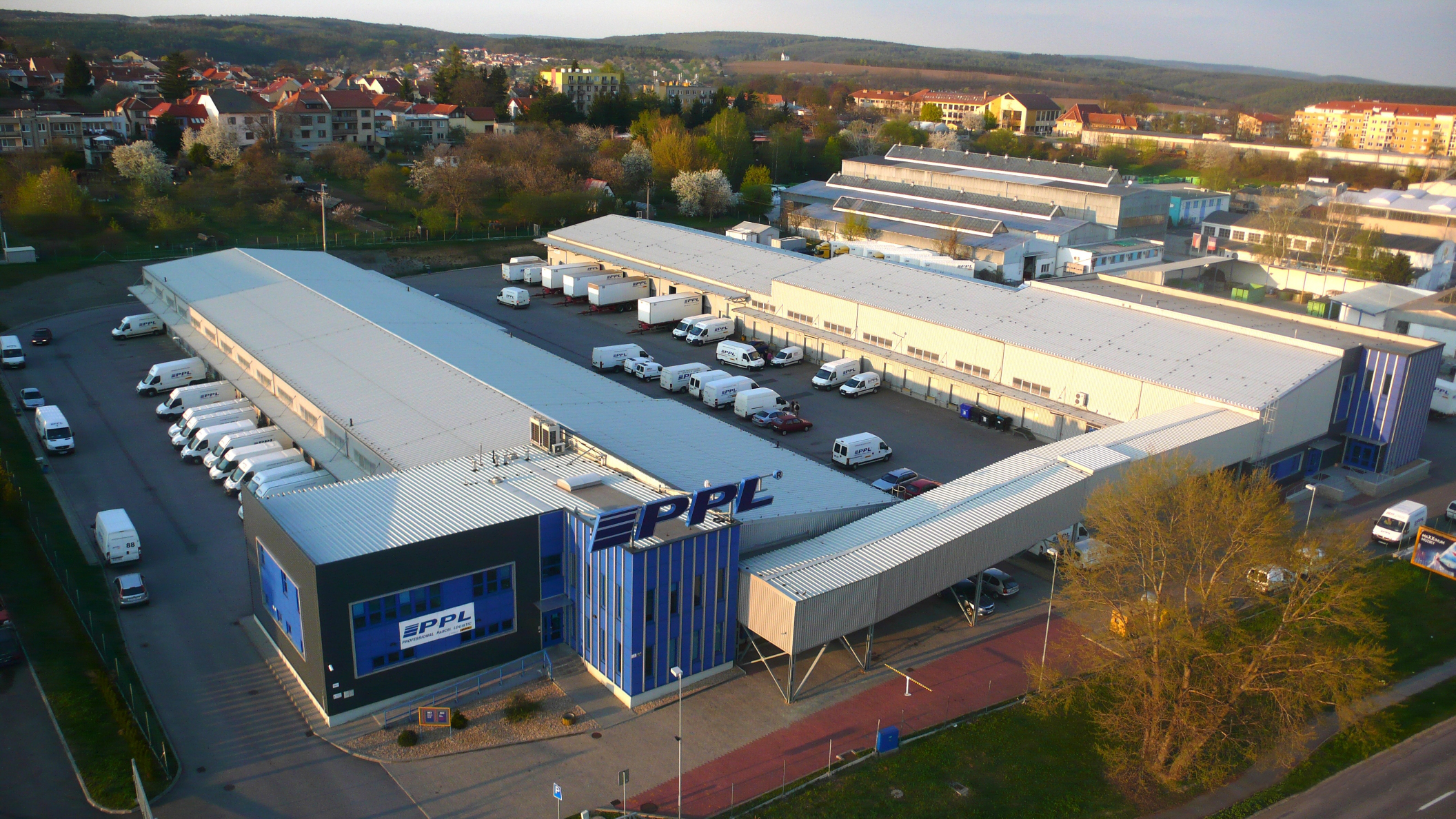 Letecke foto budov PLL